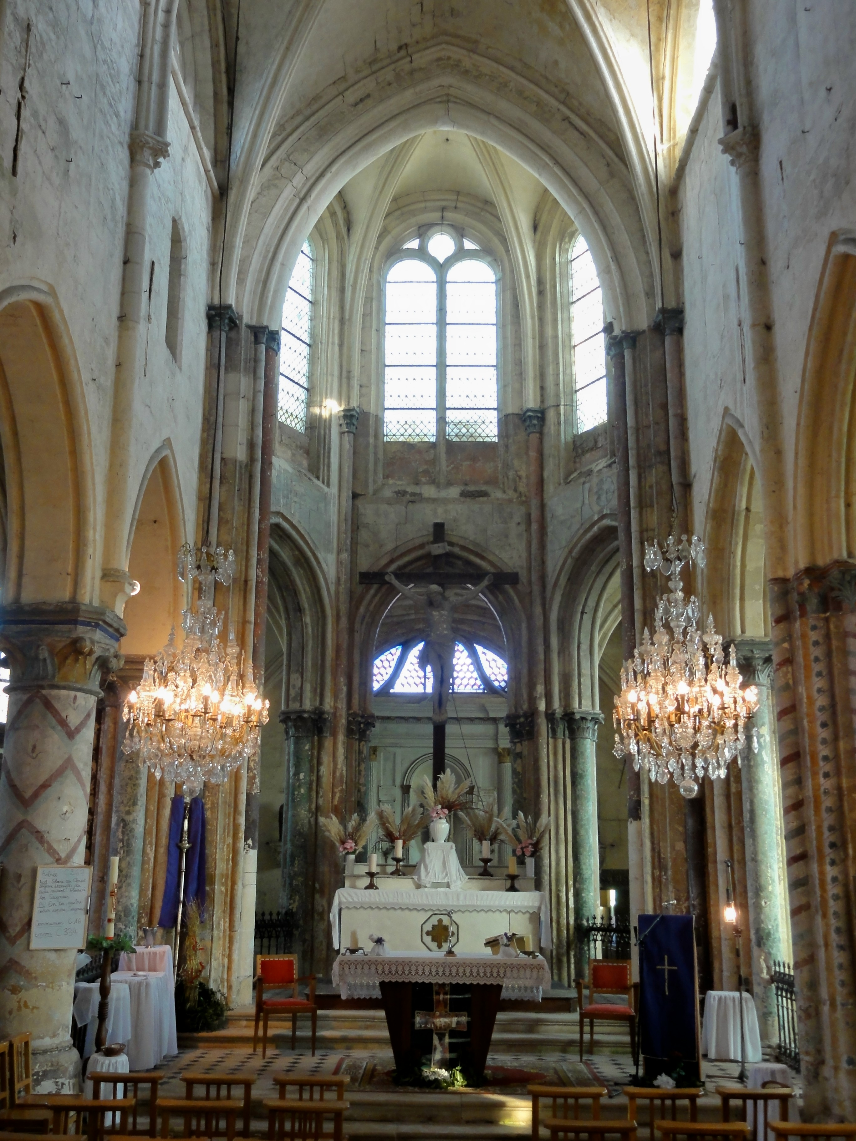 Le chœur.